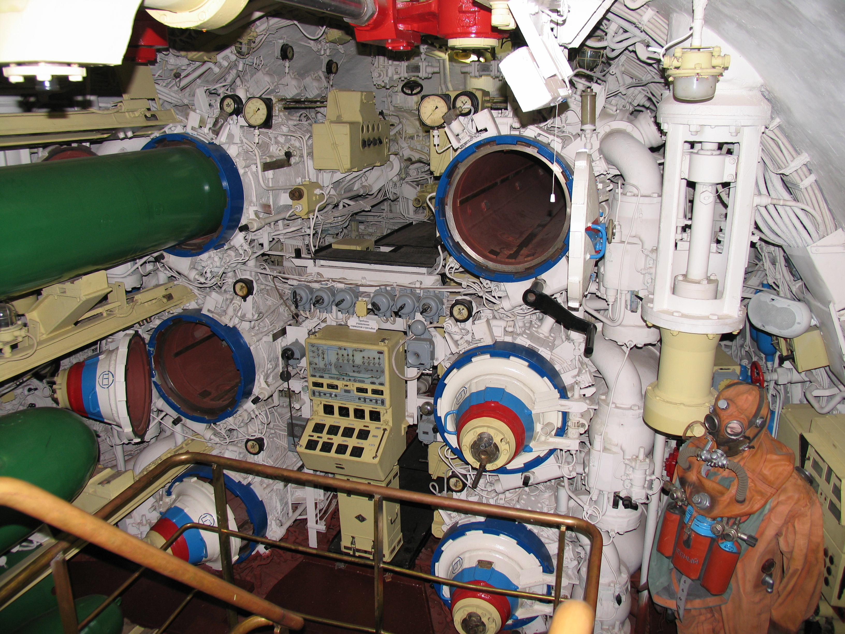 Подводная лодка Б-396. Первый торпедный отсек